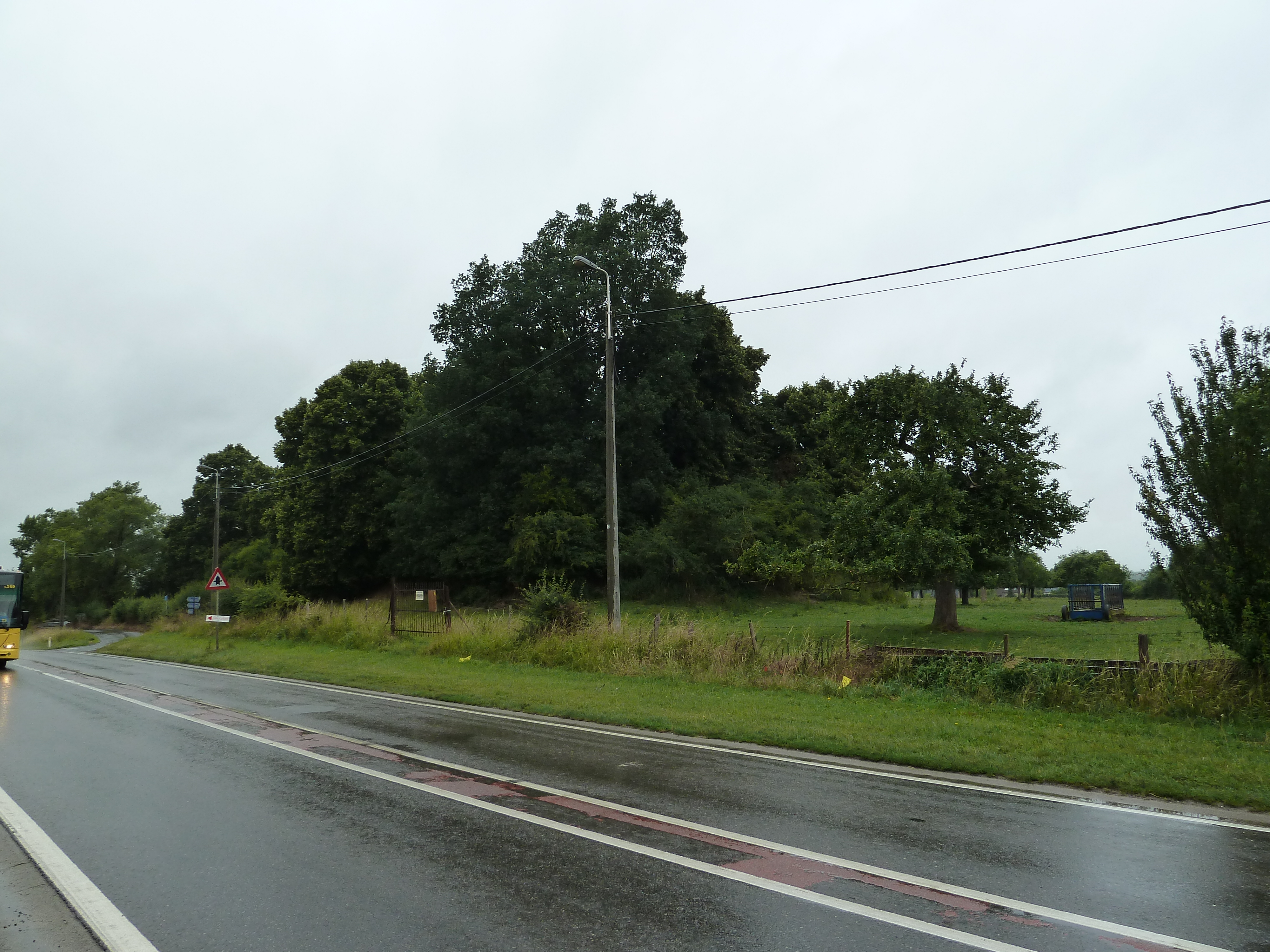 Les Cinq Tombes d'Omal, Geer, Belgique